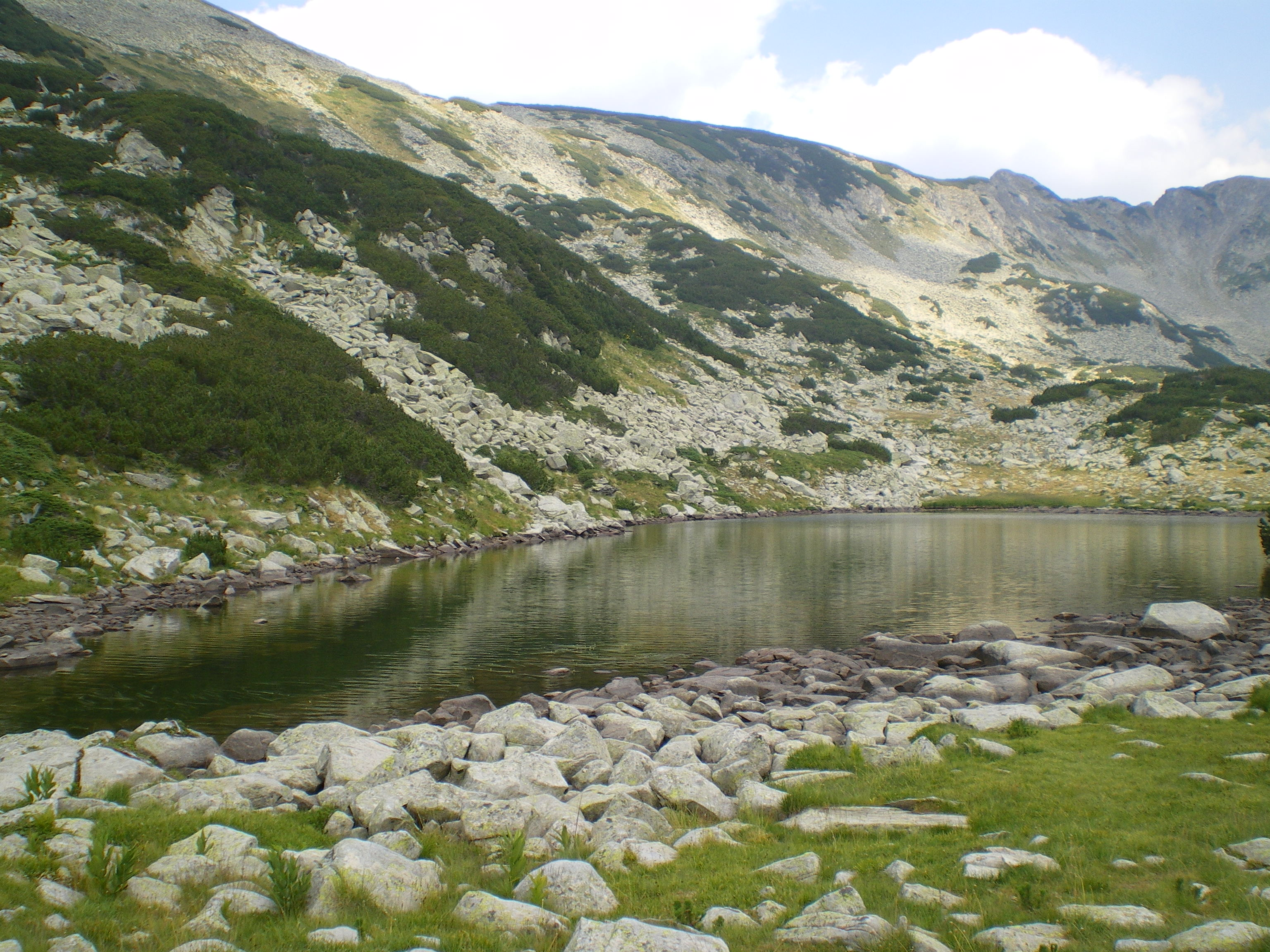 Zhabeshko lake, Pirin, Bulgaria